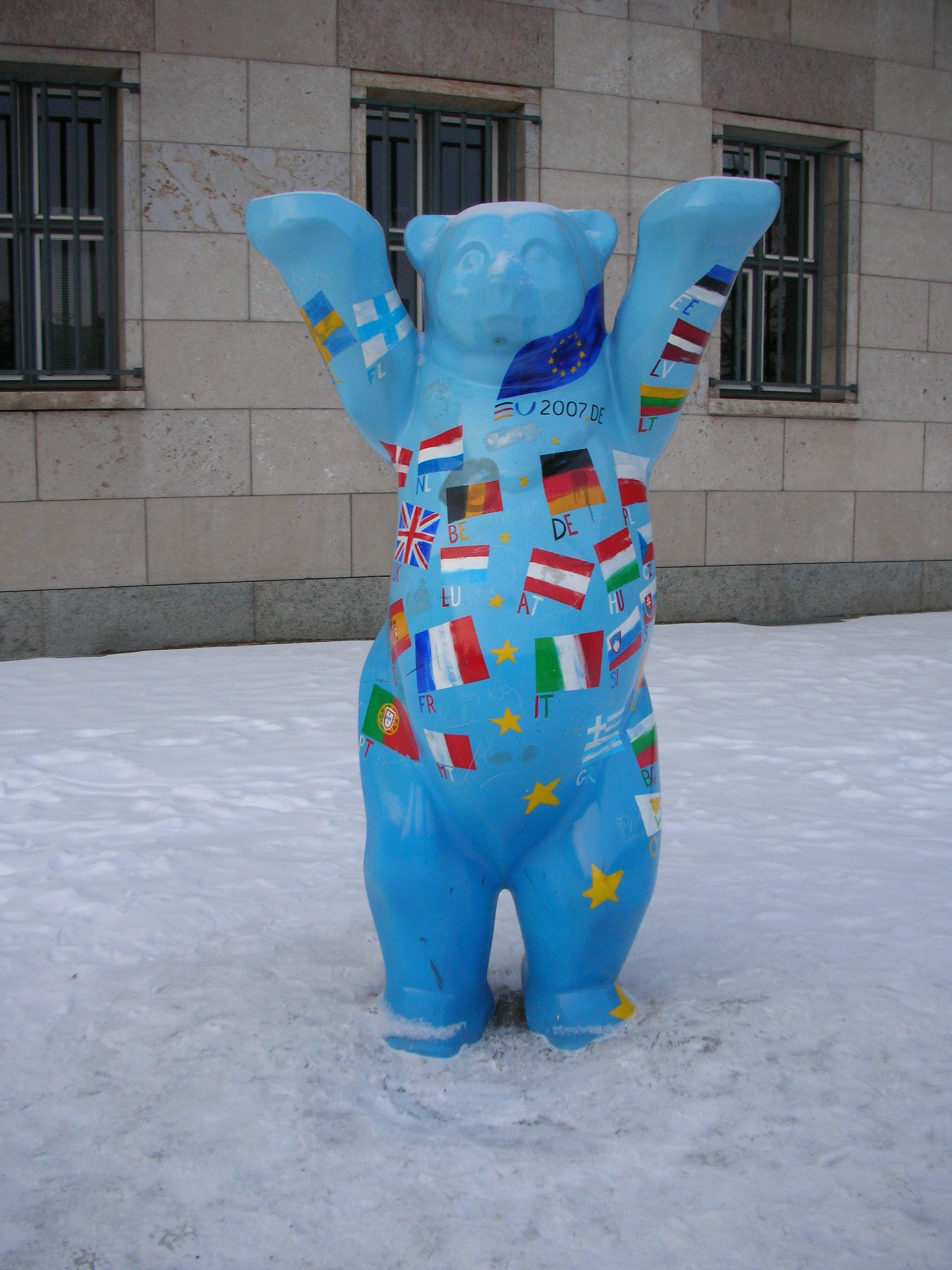 un dels óssos de Berlín, febrer de 2010